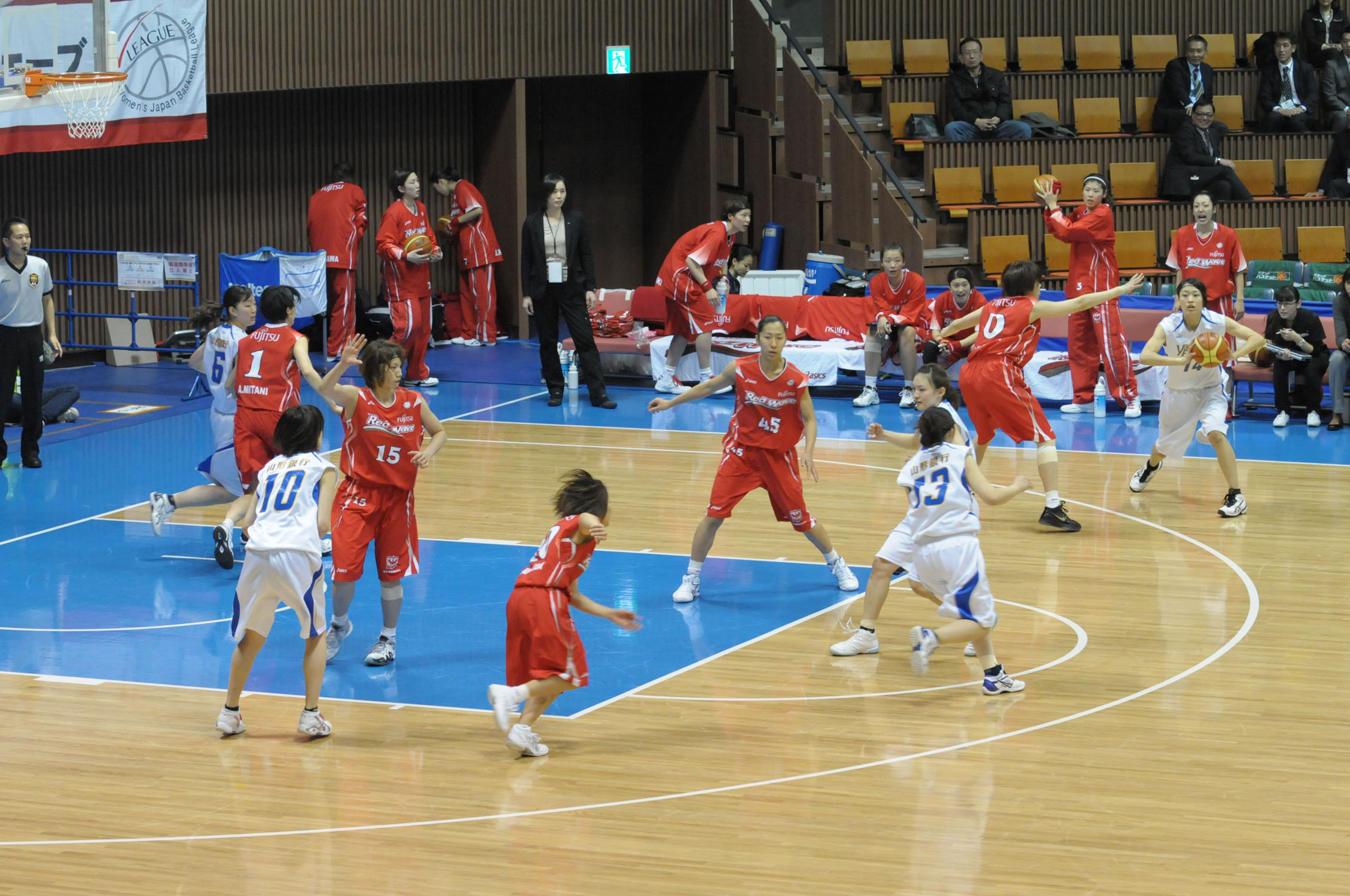 2013年全日本総合バスケットボール選手権大会3回戦、山形銀行対富士通レッドウェーブ。代々木第二体育館で。